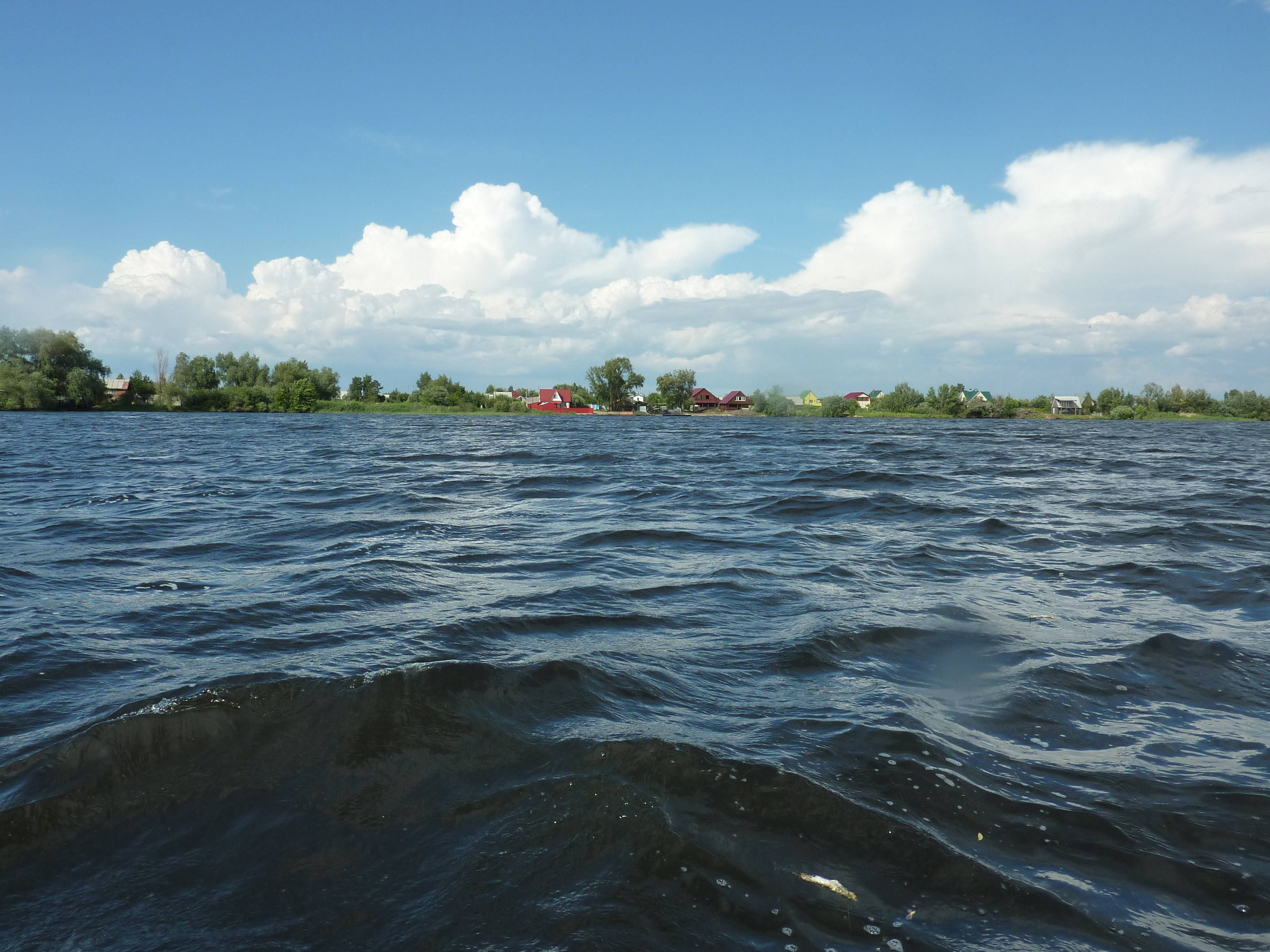 Дачи